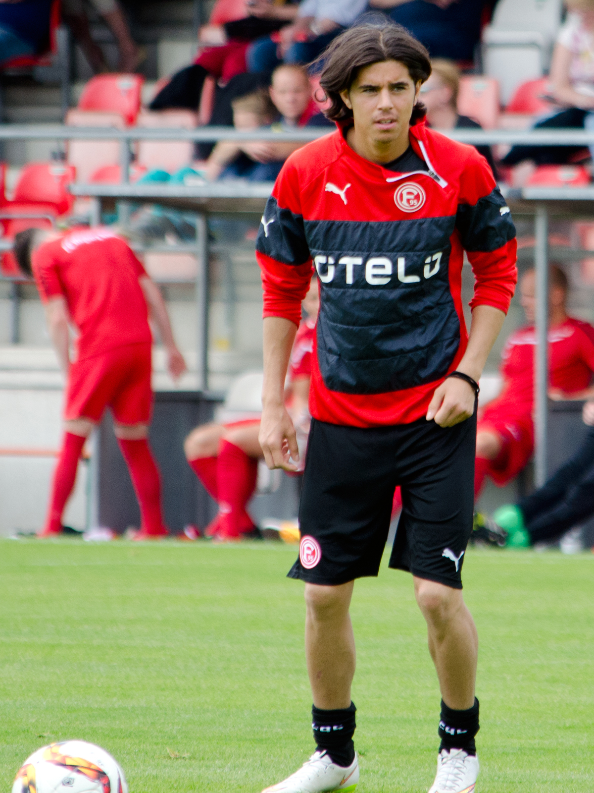 Kaan Akca, deutsch-türkischer Fußballspieler